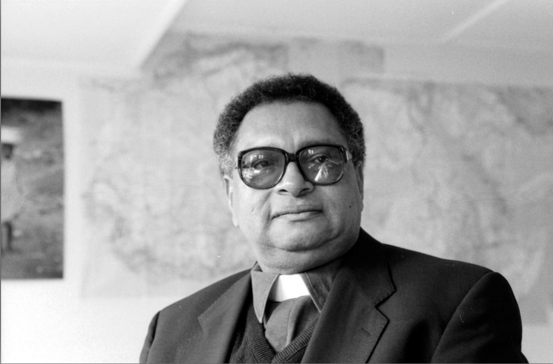 Aartsbisschop van Monrovia mgr. Michael Kpakala Francis bij Mensen in Nood.